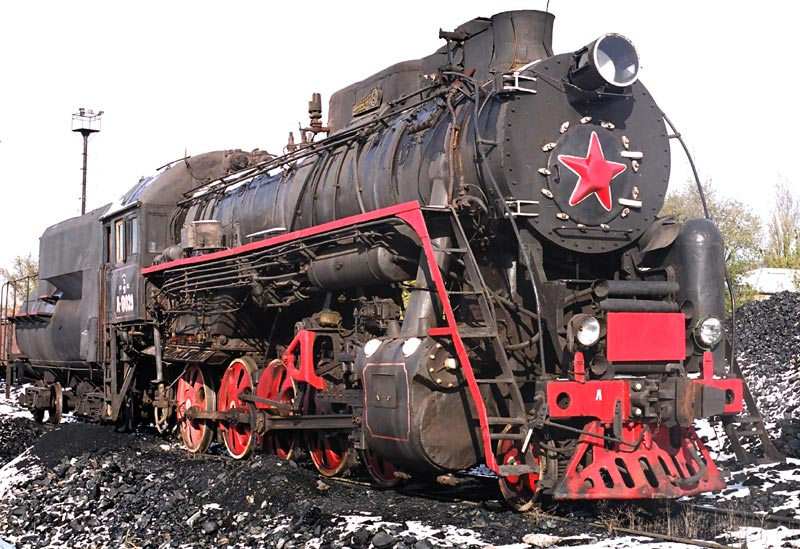 Паровоз Л-0029 в депо Батайск (Ростовская область, Россия)